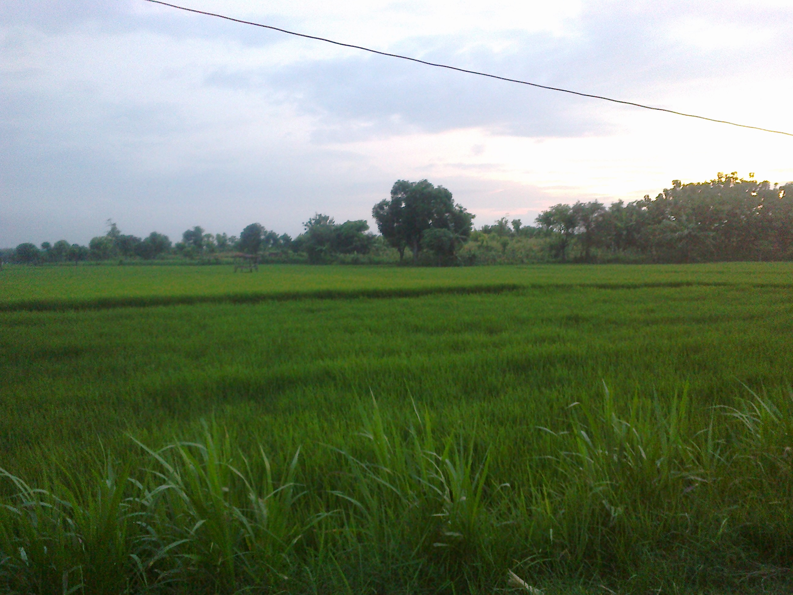 Laren adalah daerah pesawahan di sebelah Barat Desa Rawasan, penghubung Rawasan Desa dengan Dukuh Karangrejo